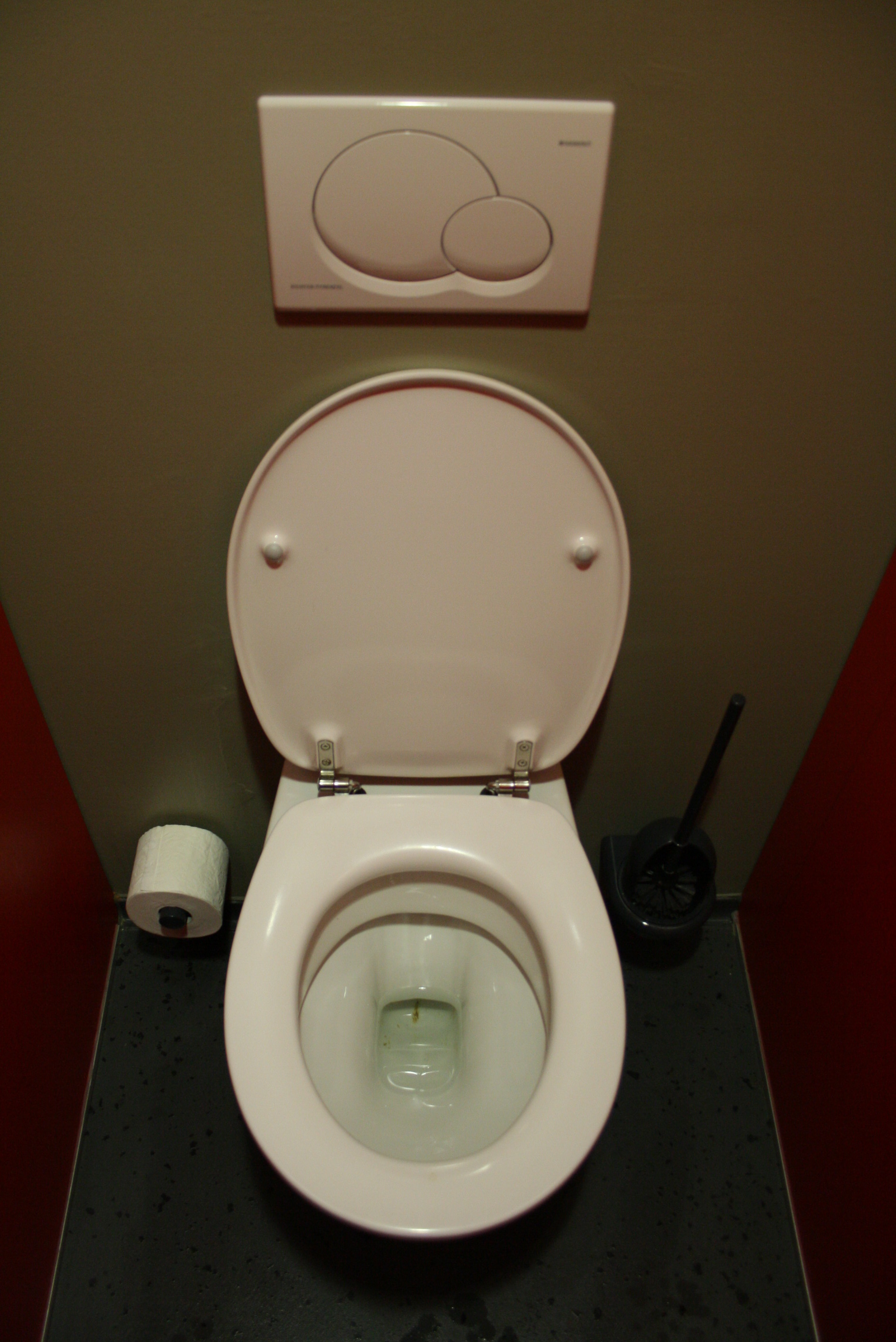 Toilettenkabine im Deutschen Theater in München.